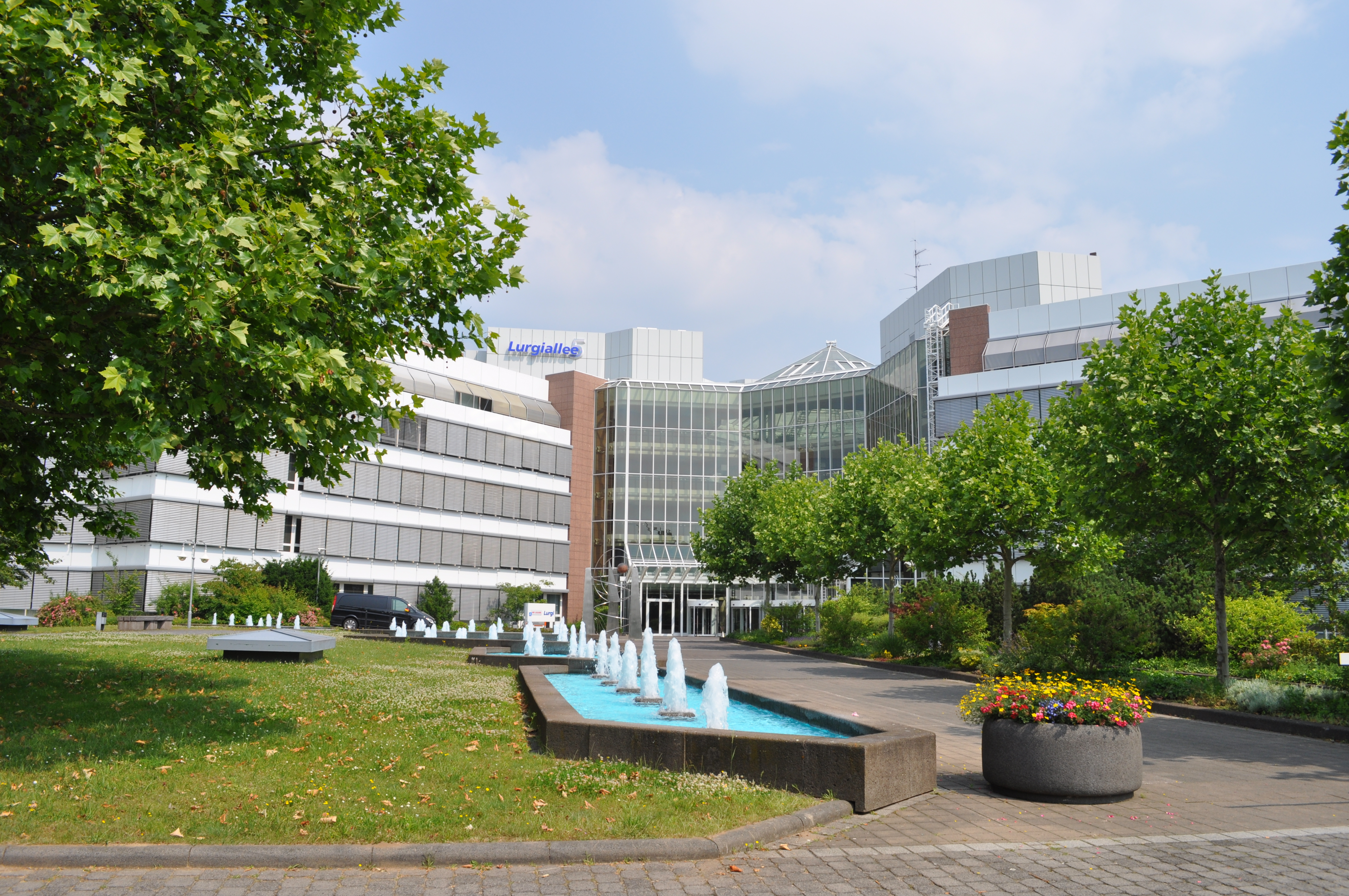 Lurgihaus im Mertonviertel in Frankfurt am Main